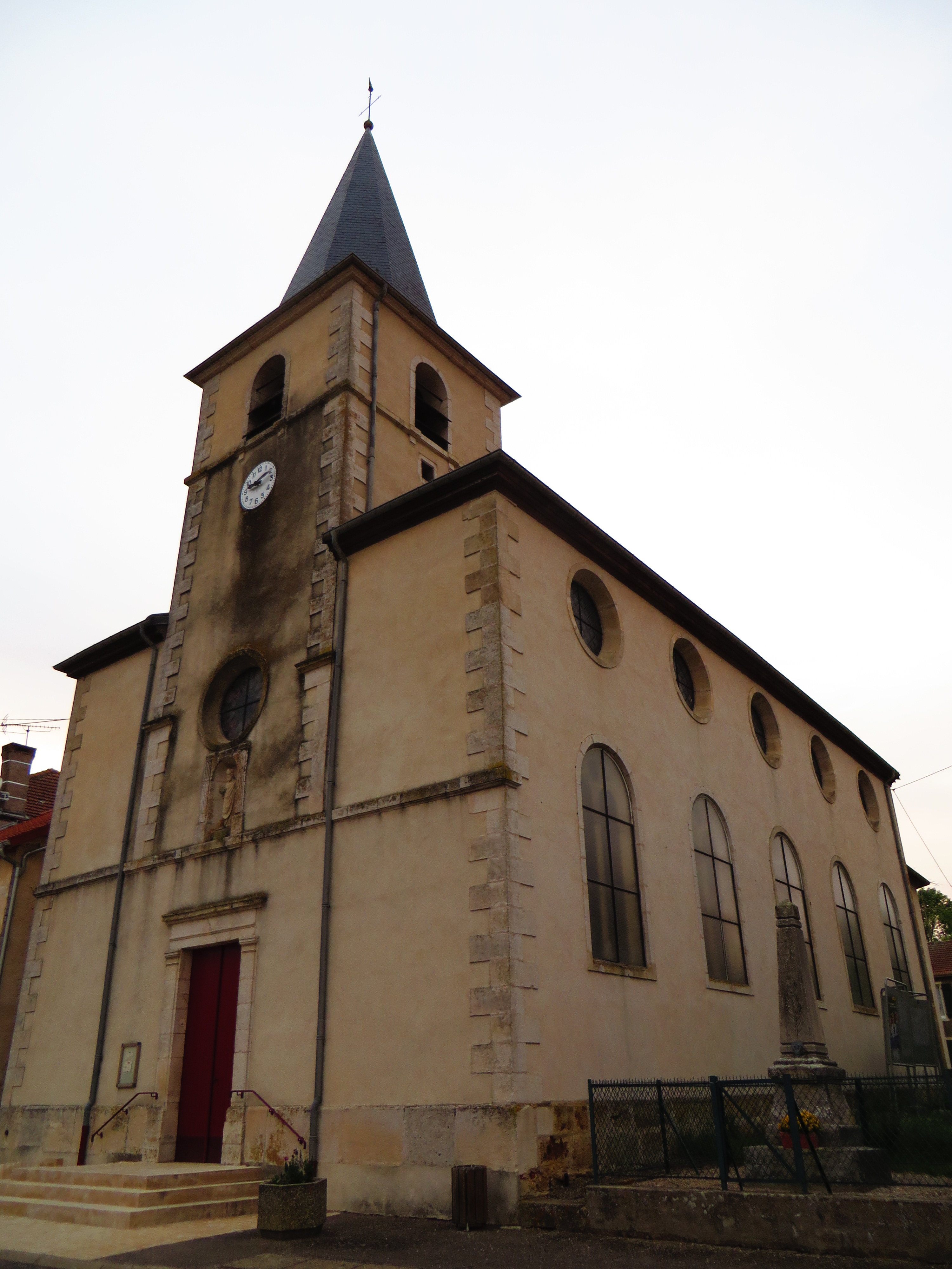 Praye eglise